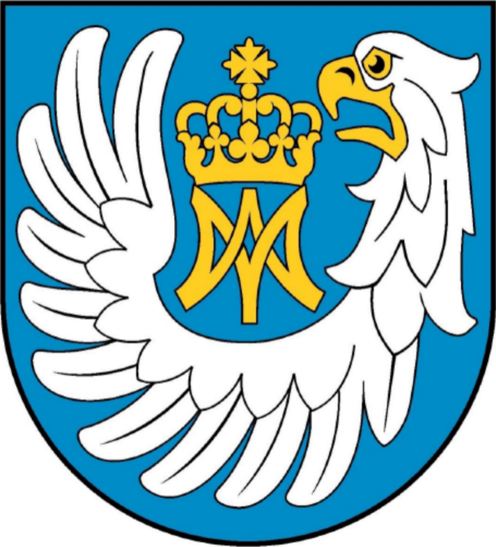 Herb gminy Nowe Piekuty